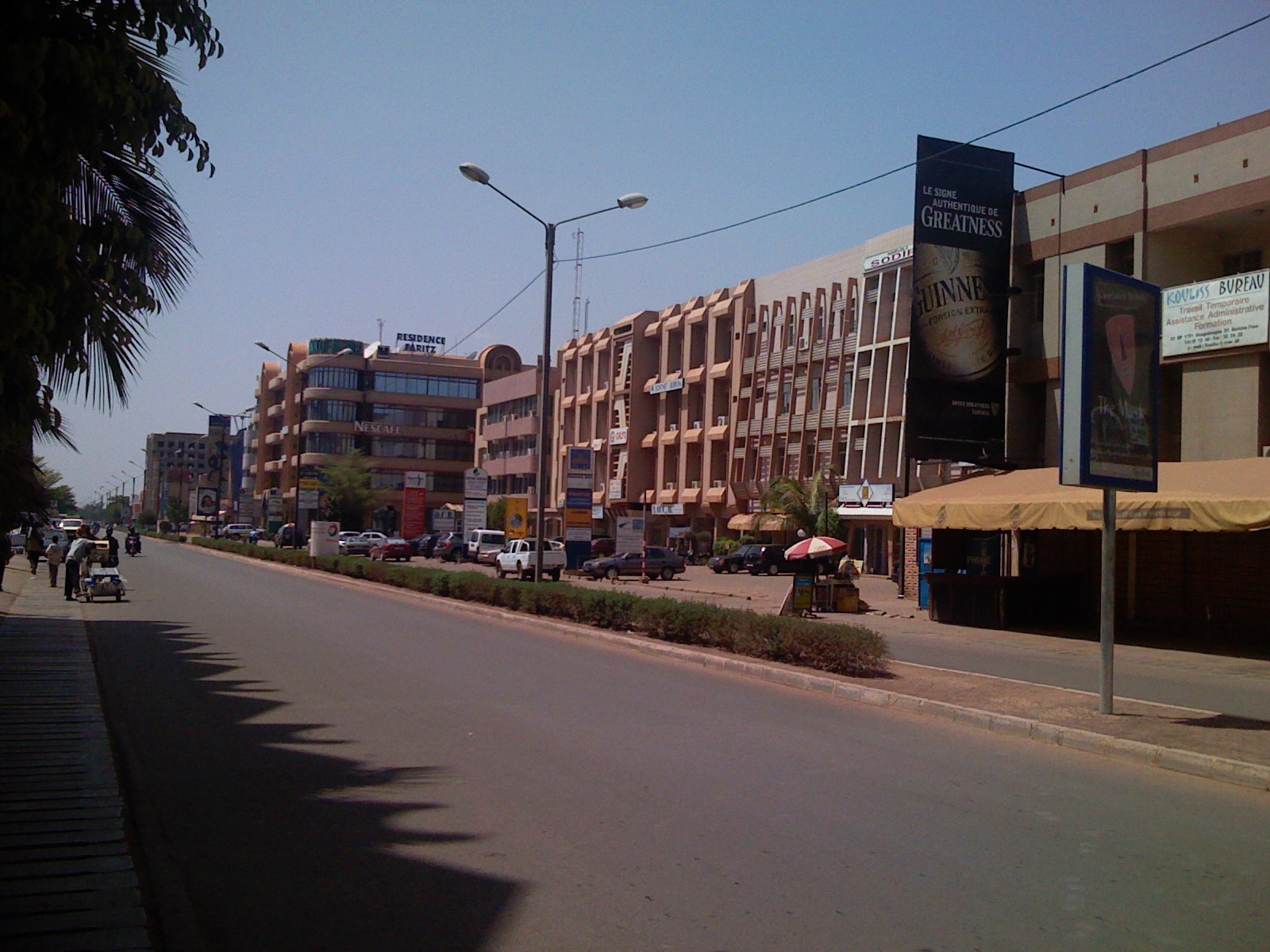 Avenue Kouamé N'Krumah à Ouagadougou (Burkina Faso)